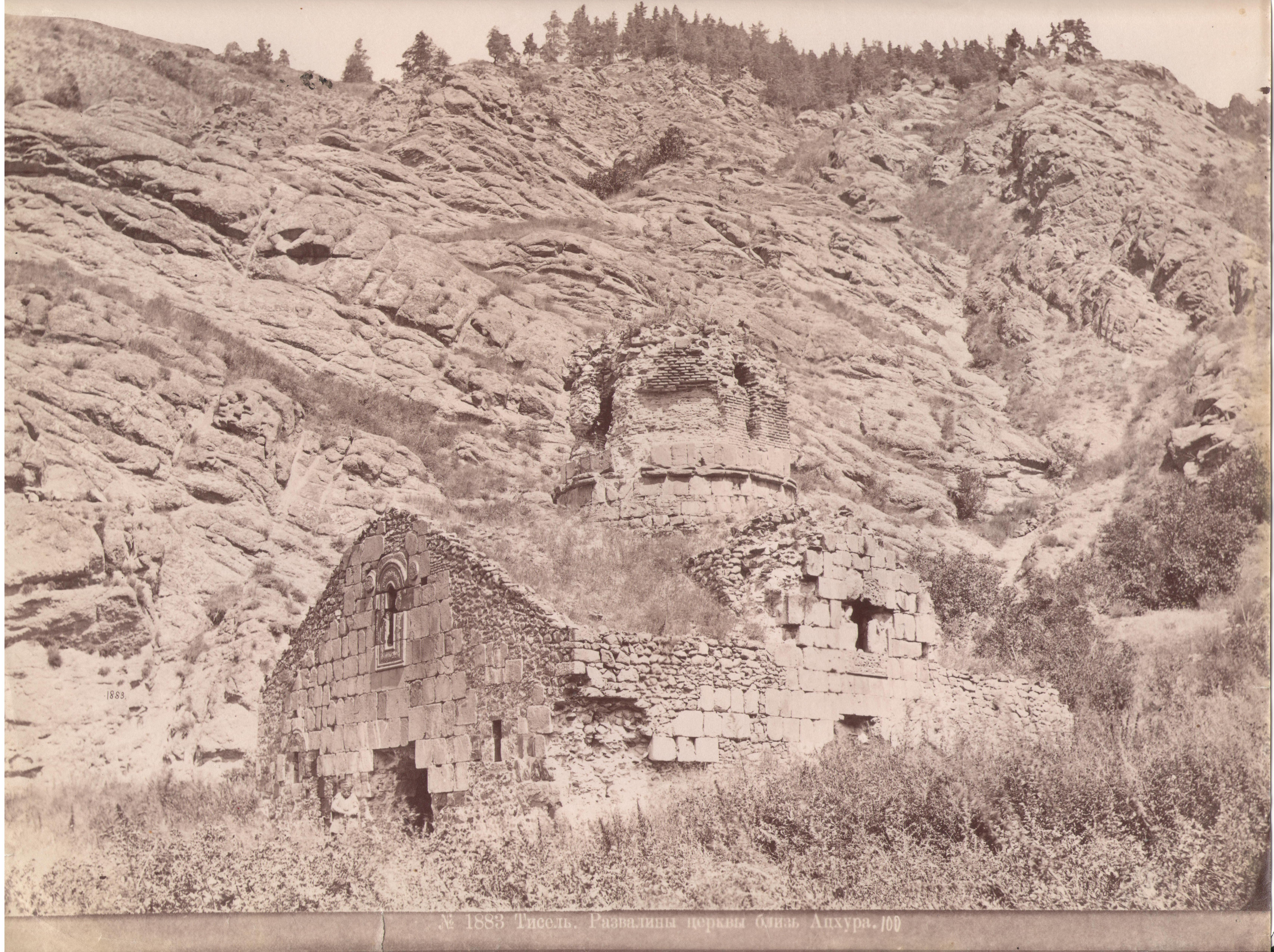 თისელის ეკლესია